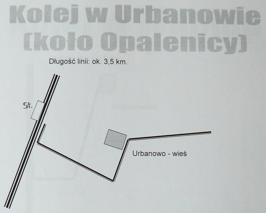 Schemat przebiegu kolei folwarcznej w Urbanowie.